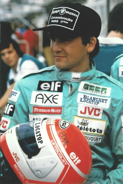 Michel Trollé Formule 3000 GDBA